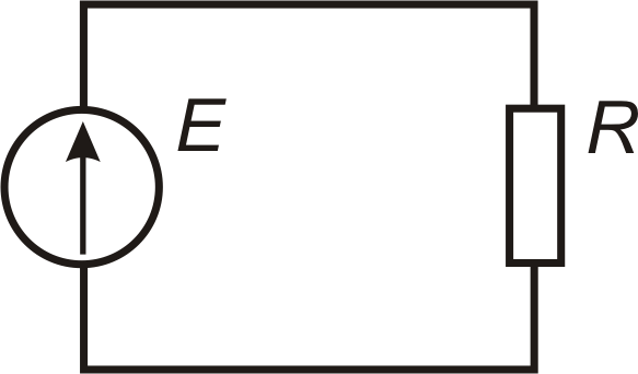 Рисунок 1 — Условное обозначение электрической цепи.